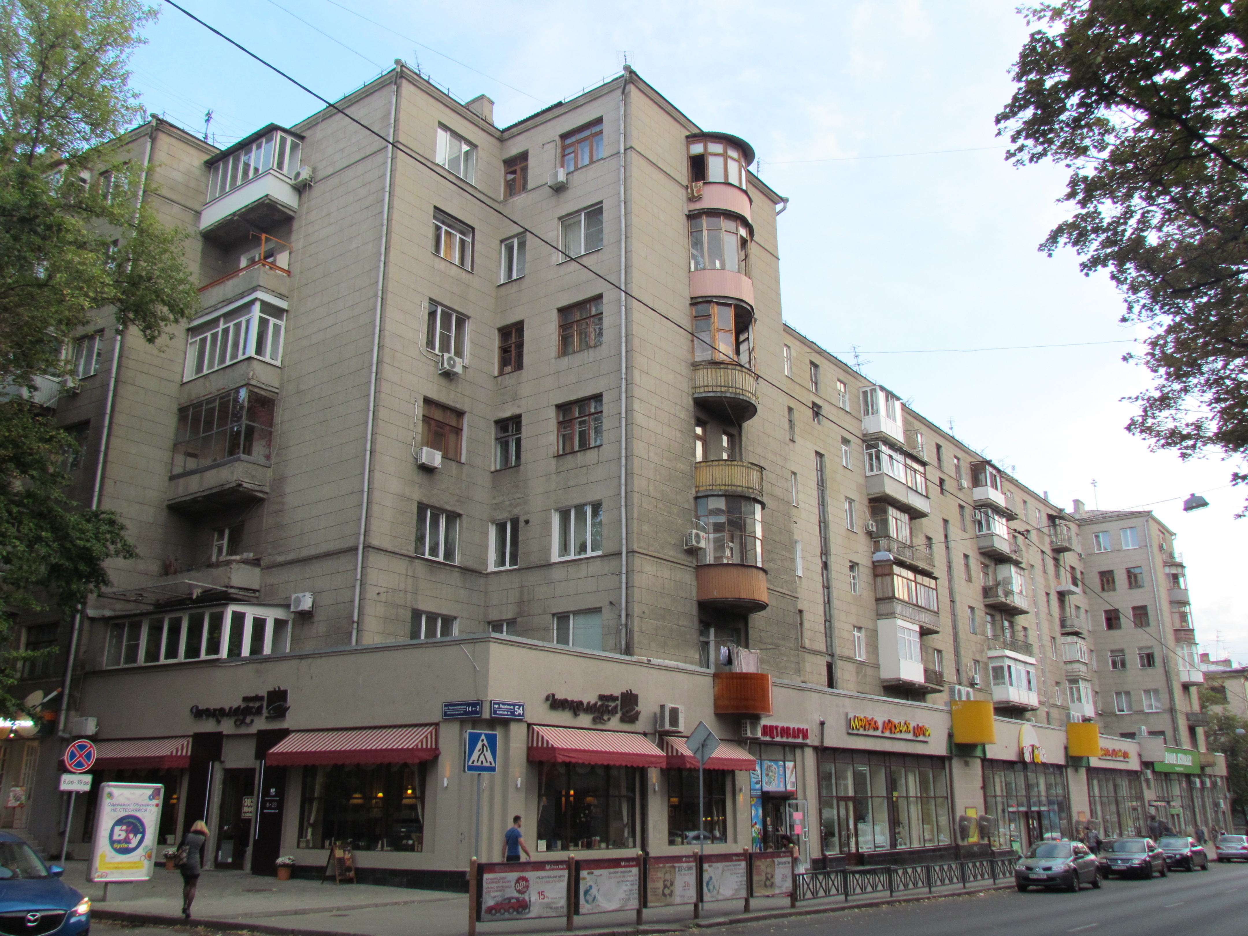 Україна, Харків, вул. Пушкінська, 54